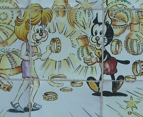 Blanquita i Pumbi, personatges de Josep Sanchis